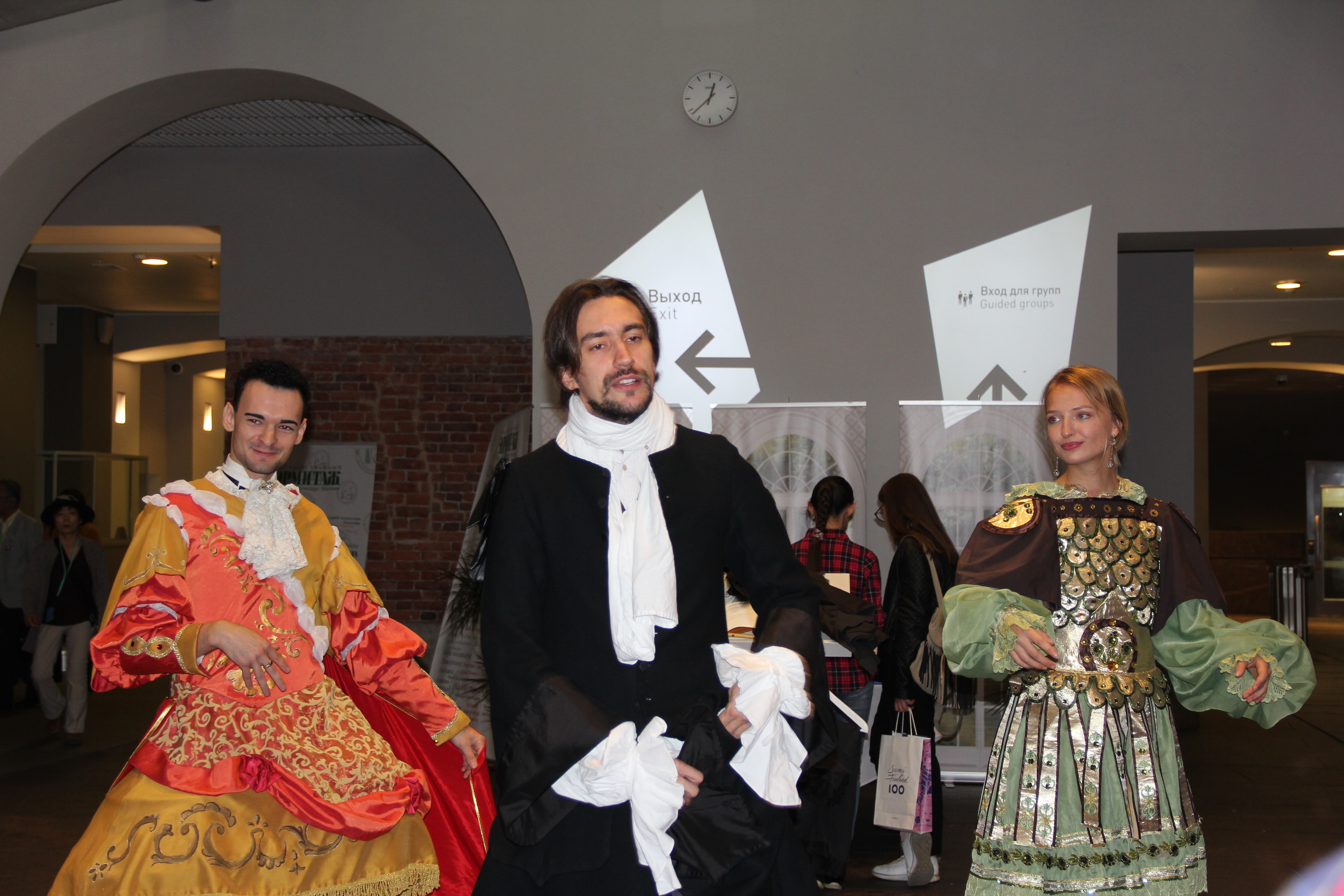 Volontører ved Discover your Europe